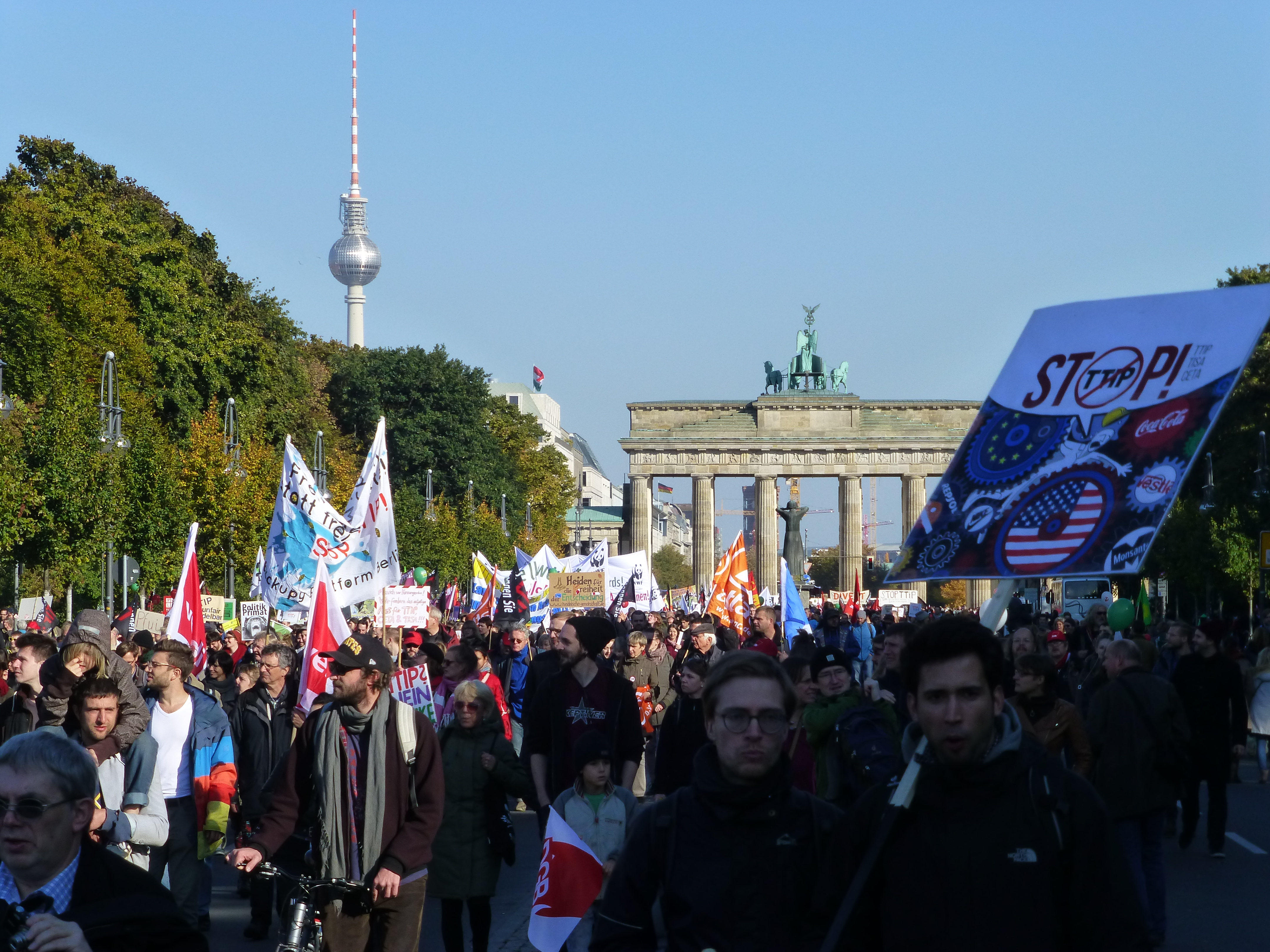 Grossdemonstration gegen TTIP in Berlin Oktober 2015